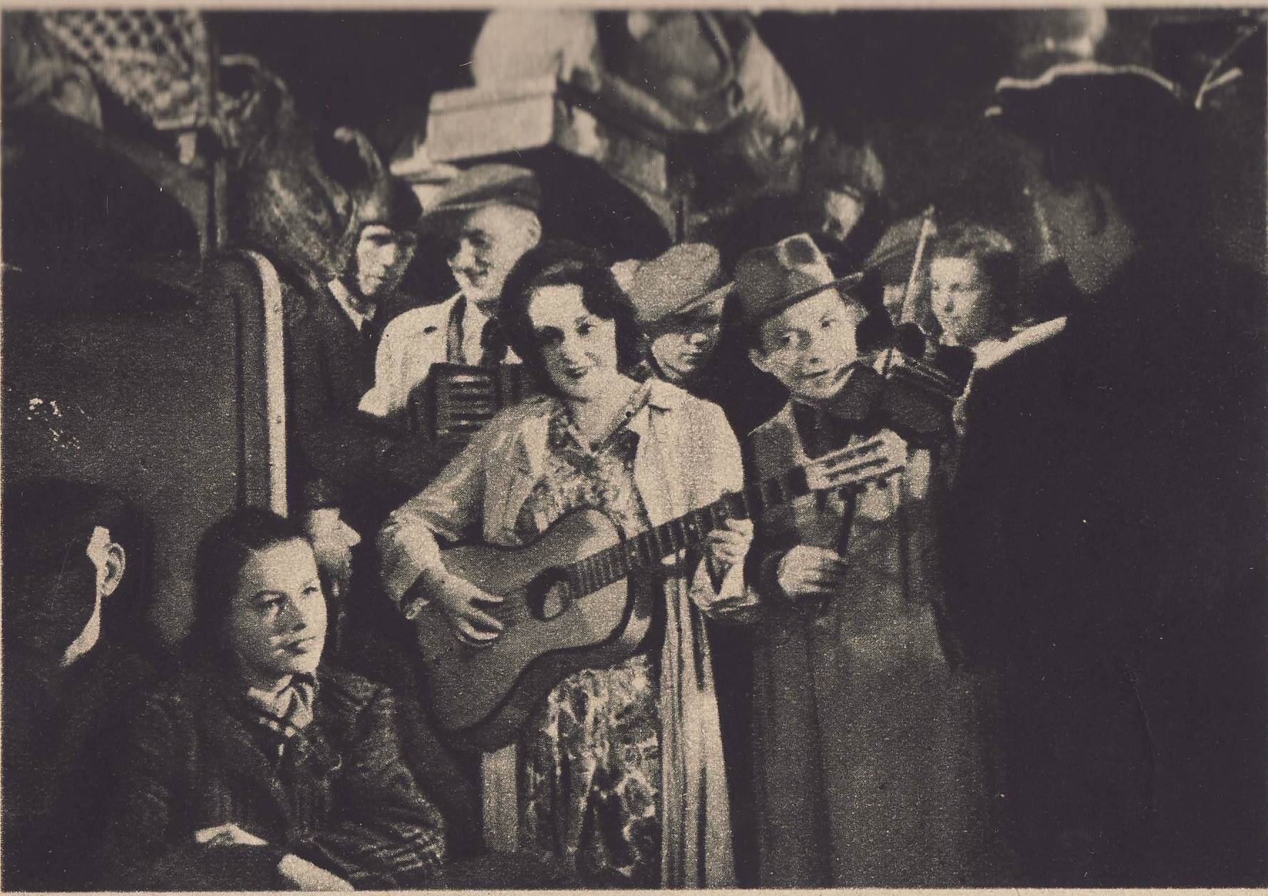 Kadr z filmu fabularnego Zakazane Piosenki nakręconego w 1946 roku w zburzonej Warszawie.